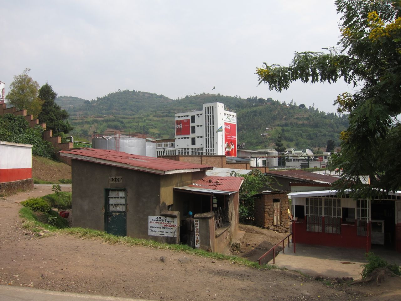 Bralirwa brouwerij